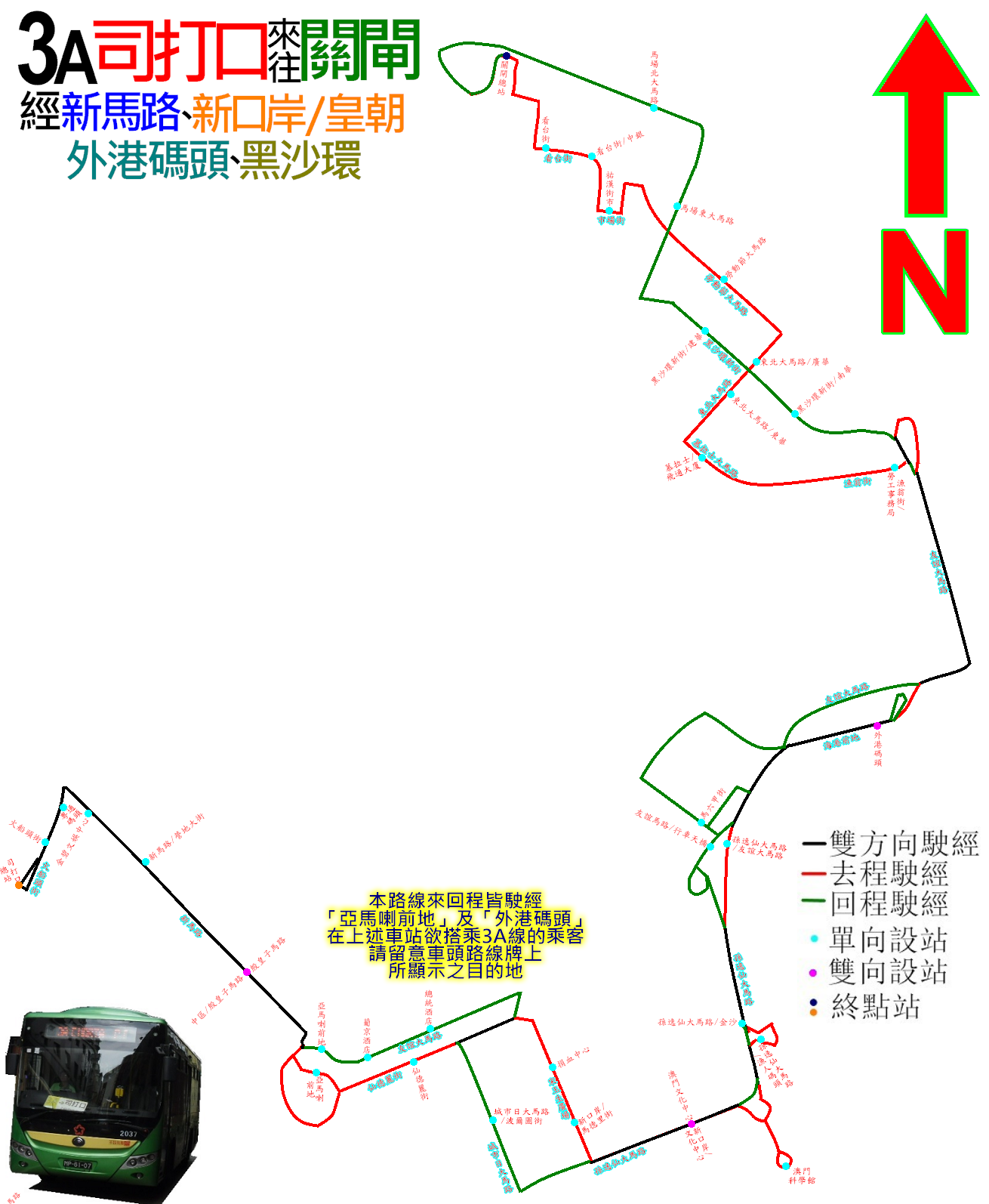 中文（香港）: 澳門巴士3A線的走線圖